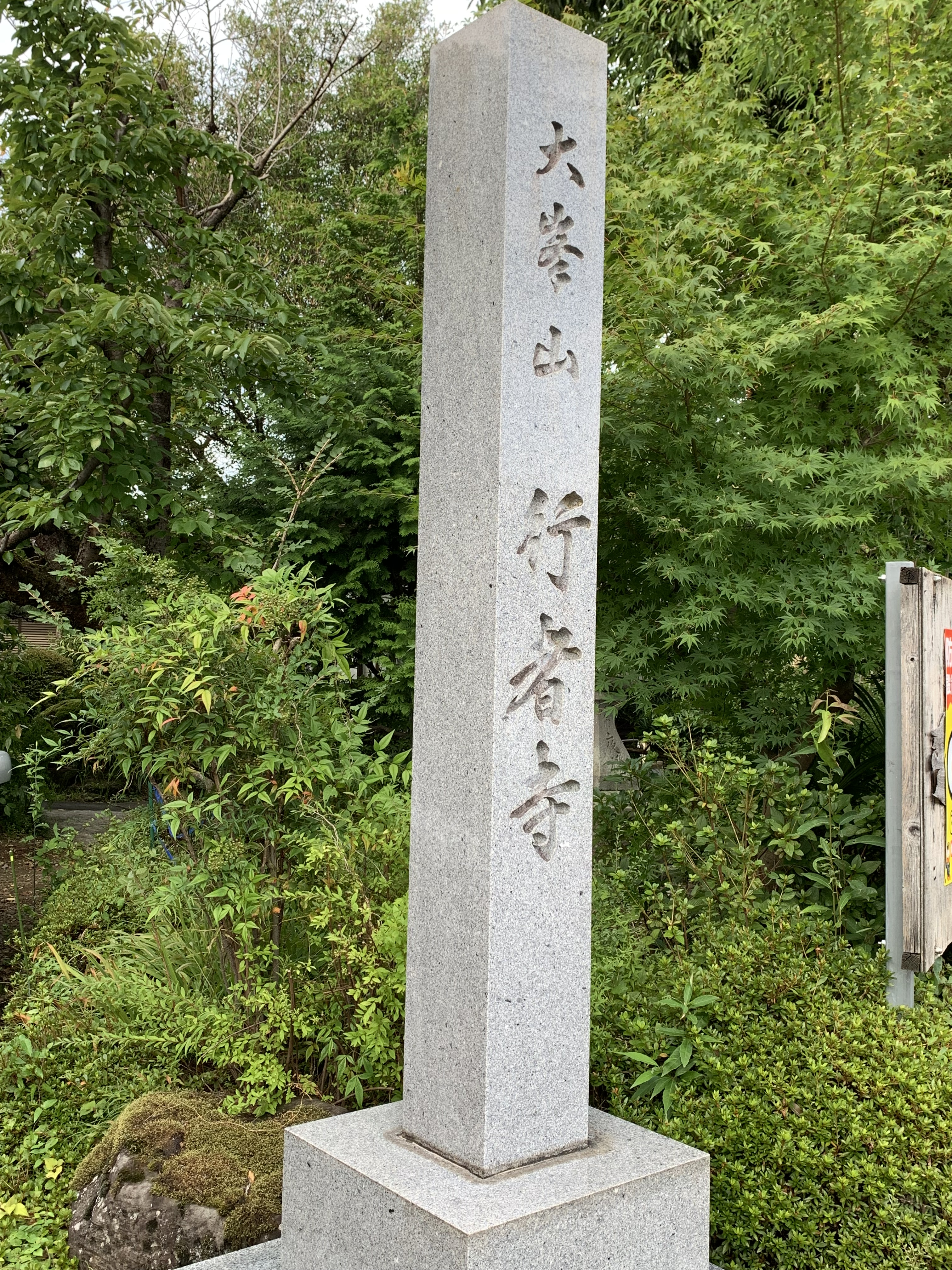 行者寺の石碑